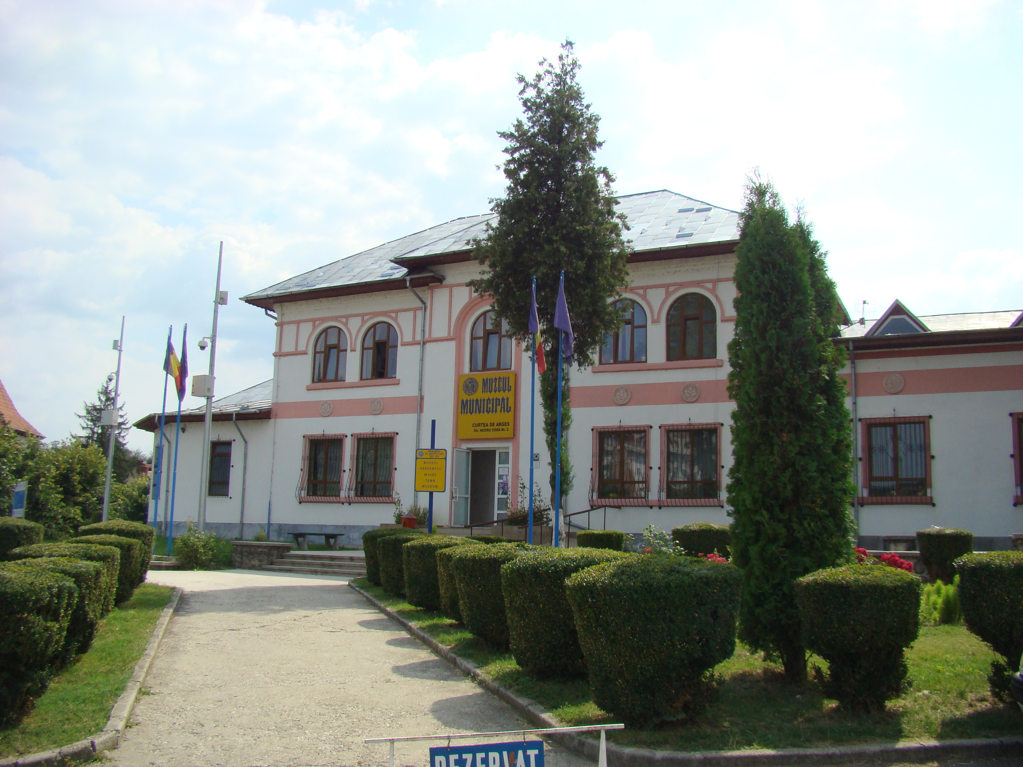 Spitalul, azi Muzeul municipal din Curtea de Argeș 01